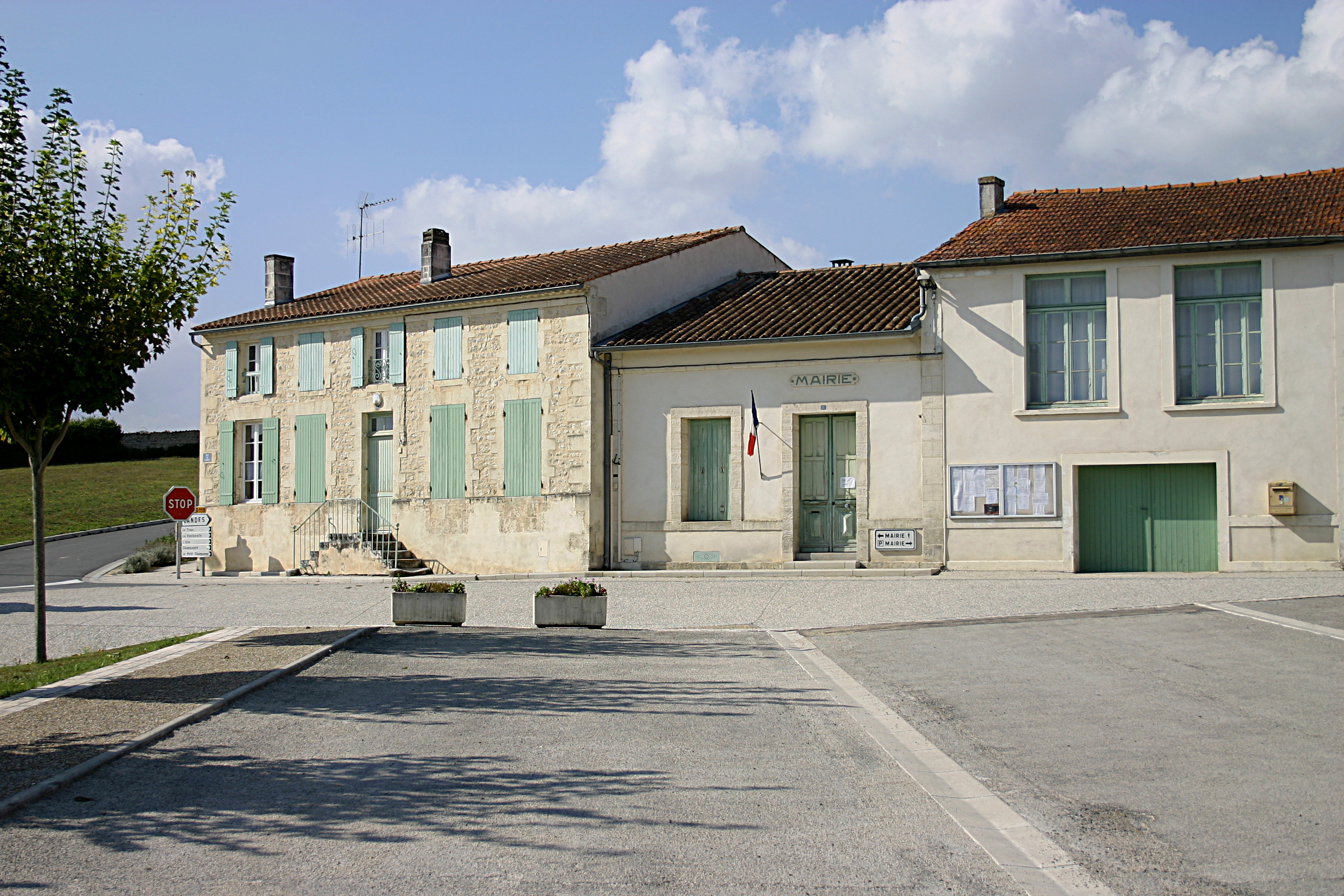 Mairie de Torxé